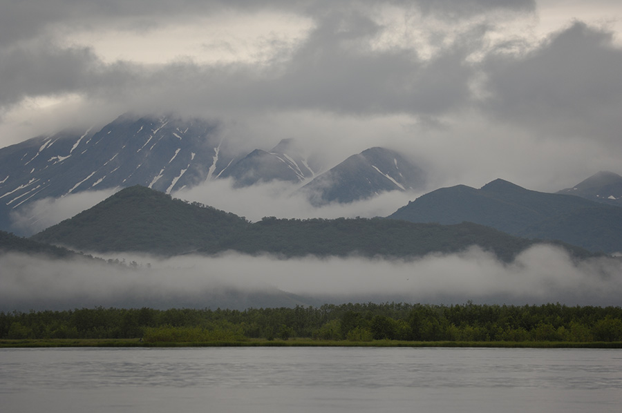 Валагинский хребет